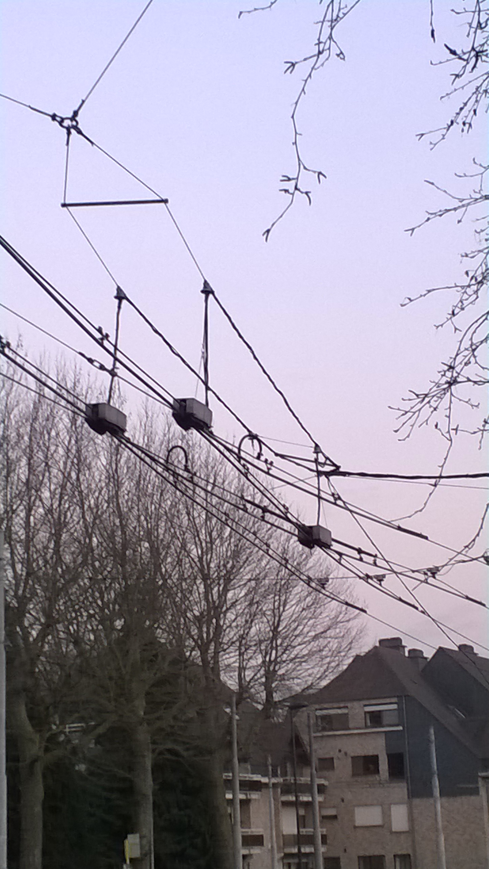 Trolleybuswissel Meersemdries Gentbrugge